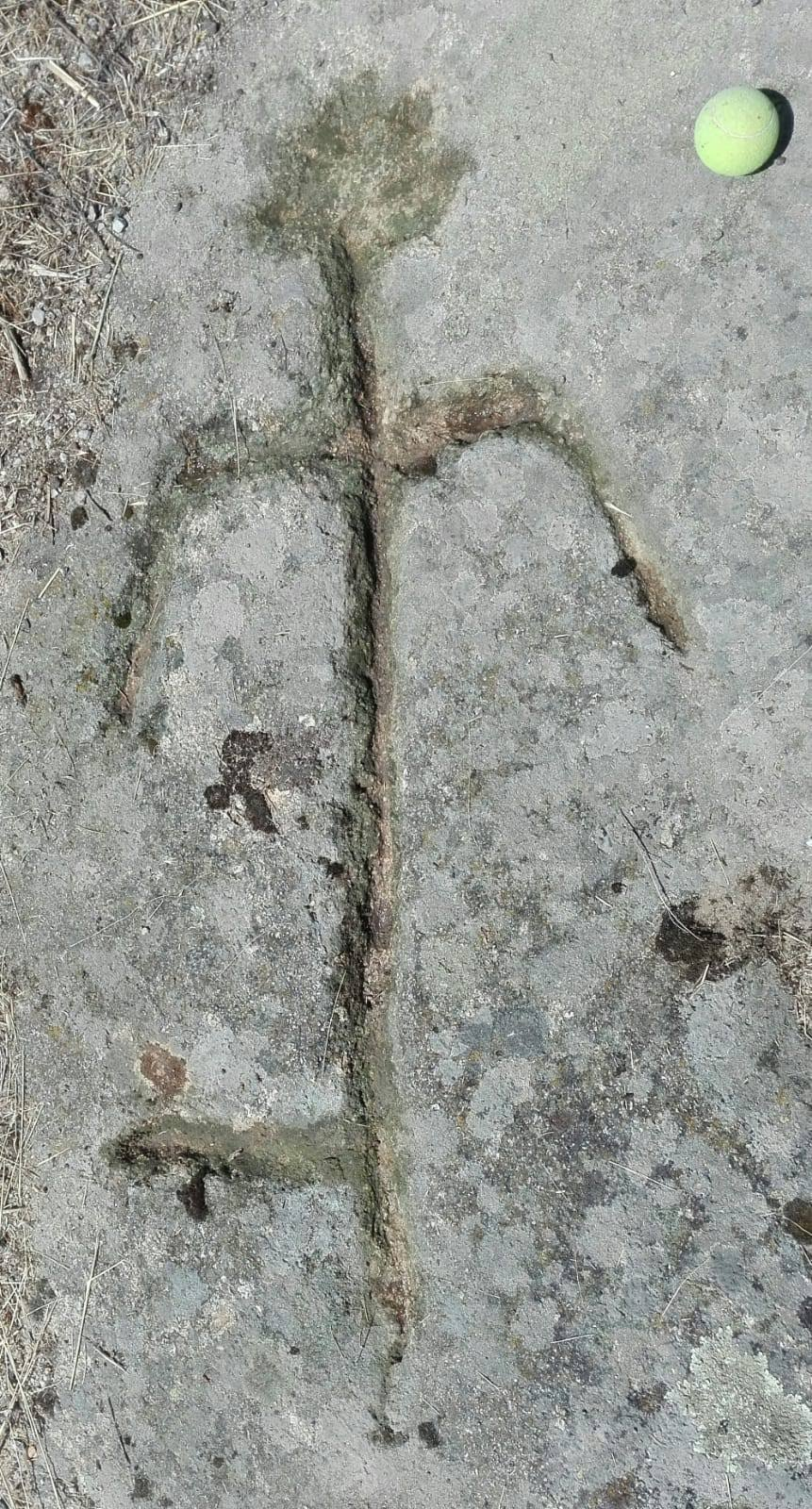 Petroglifo calcolítico situado cerca del dolmen de la dehesa de Nampalancar de Villavieja de Yeltes (Salamanca, España)